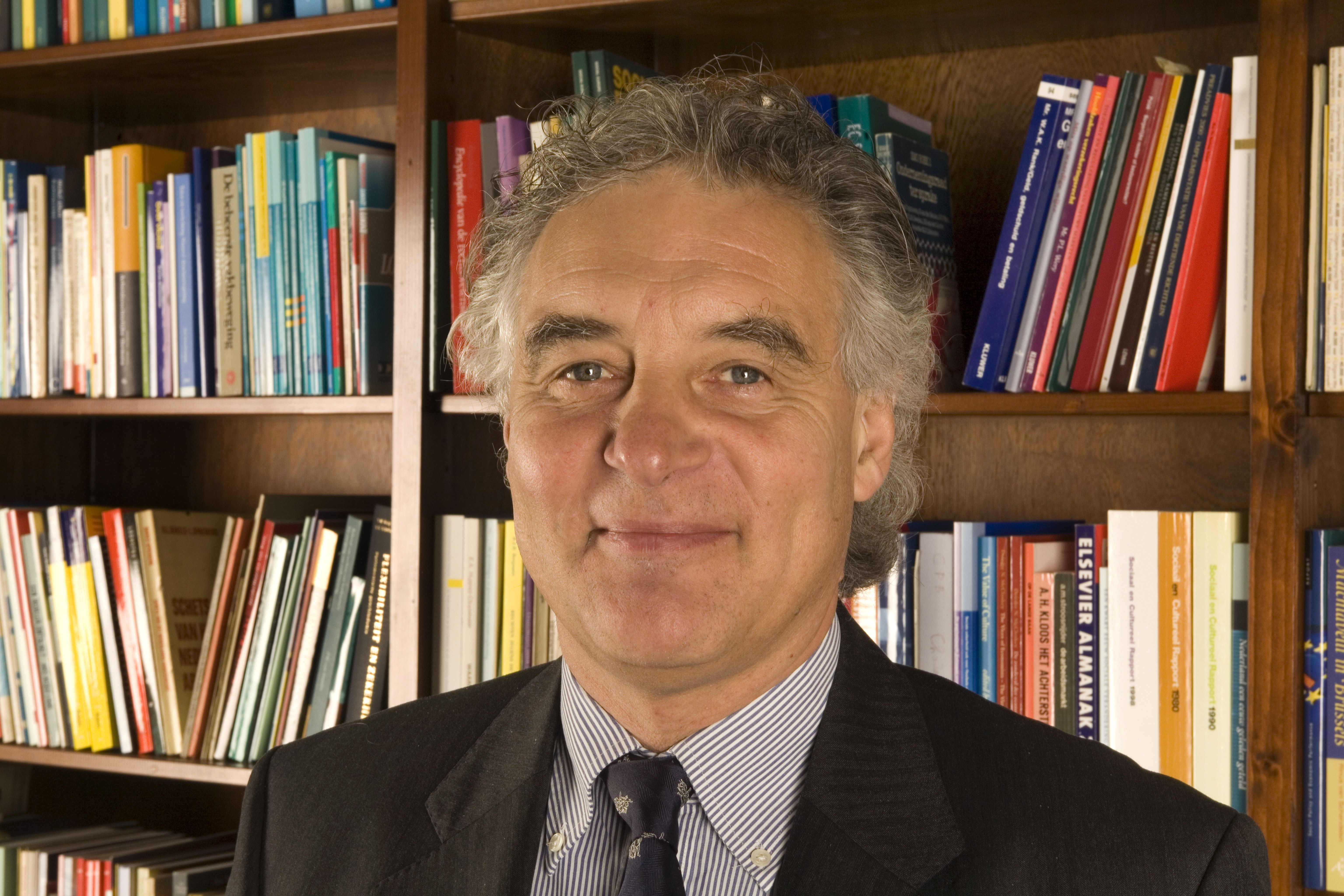 Paulus Franciscus (Paul) van der Heijden (Utrecht, 18 september 1949) is een Nederlandse hoogleraar (internationaal) arbeidsrecht. Sedert sinds begin 2007 is hij rector magnificus en voorzitter van het College van Bestuur van de Universiteit Leiden.